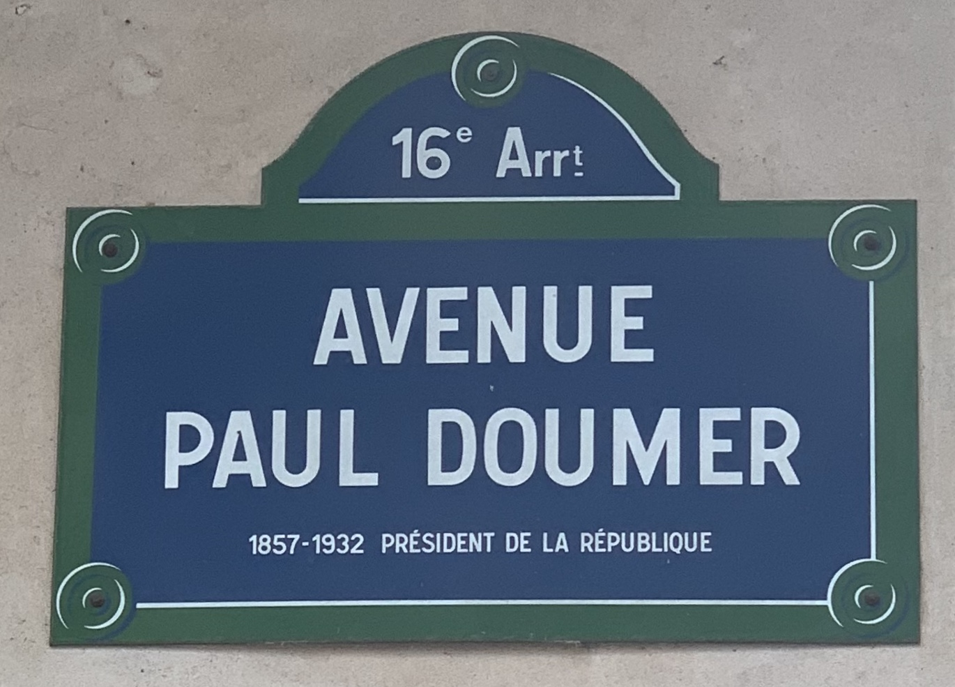 Plaque de l'avenue Paul-Doumer (Paris 16e).